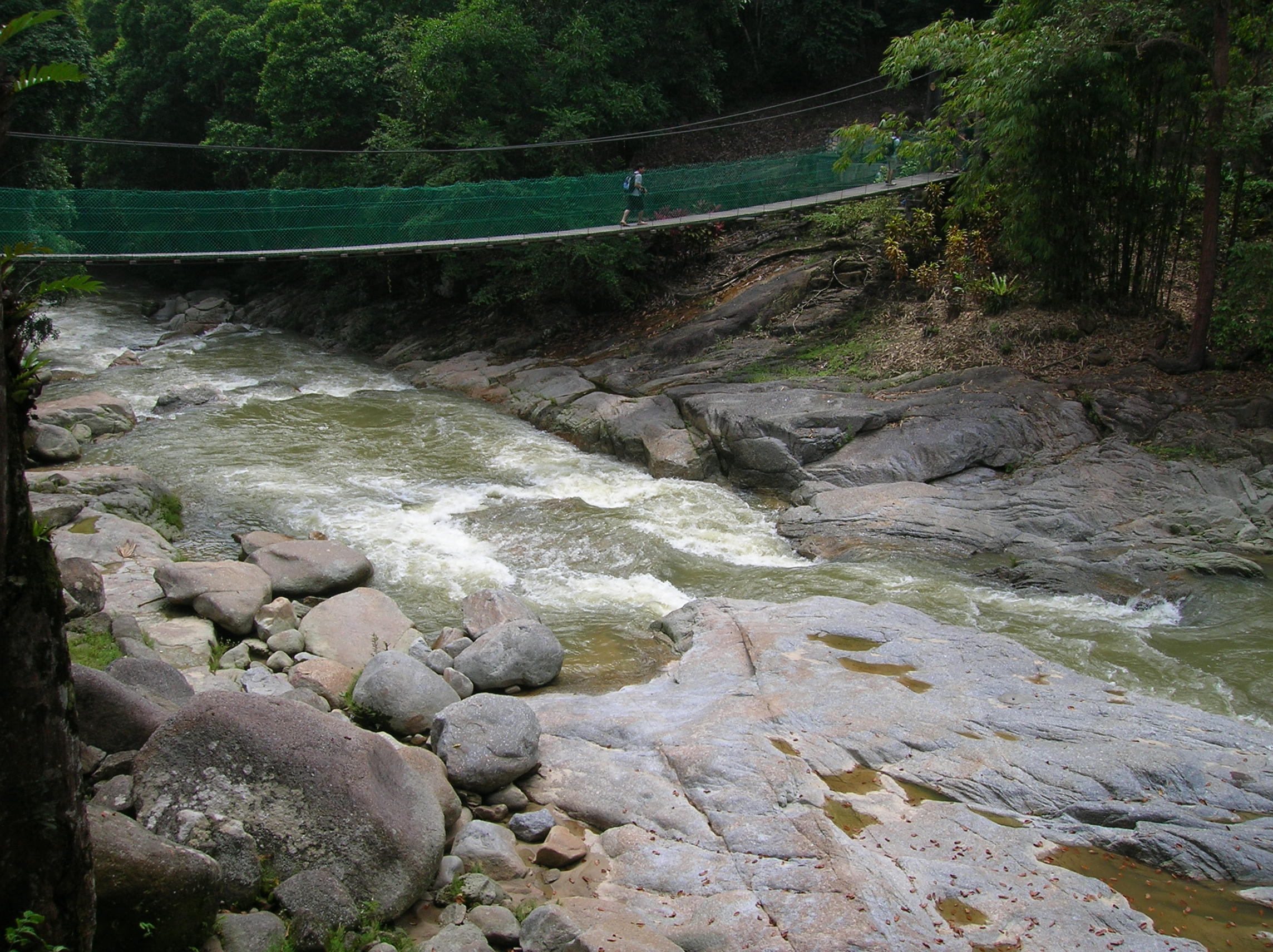 Jambatan ini terletak ke hilir air terjun.